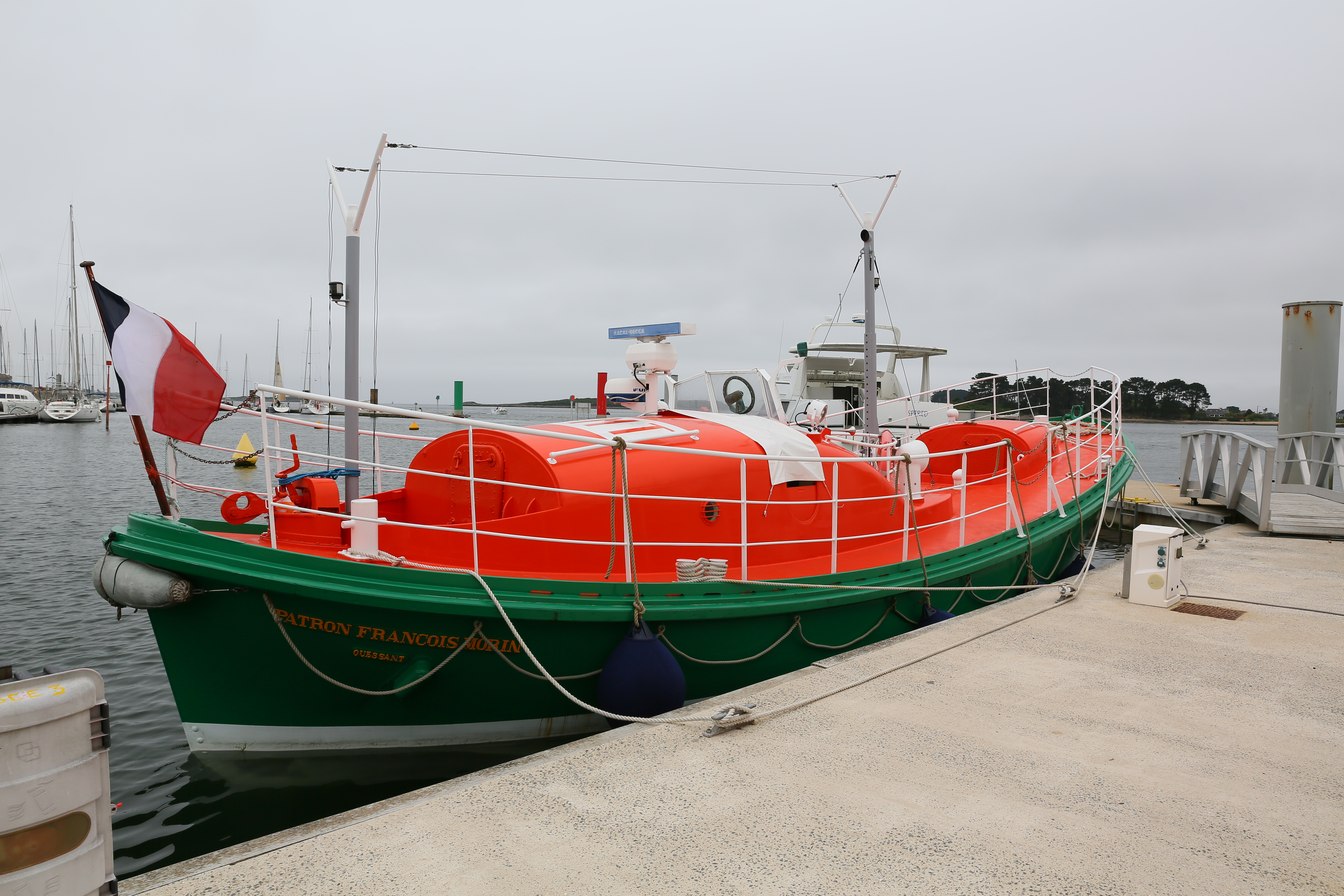 au Port de l'Aber Wrac'h à Landeda